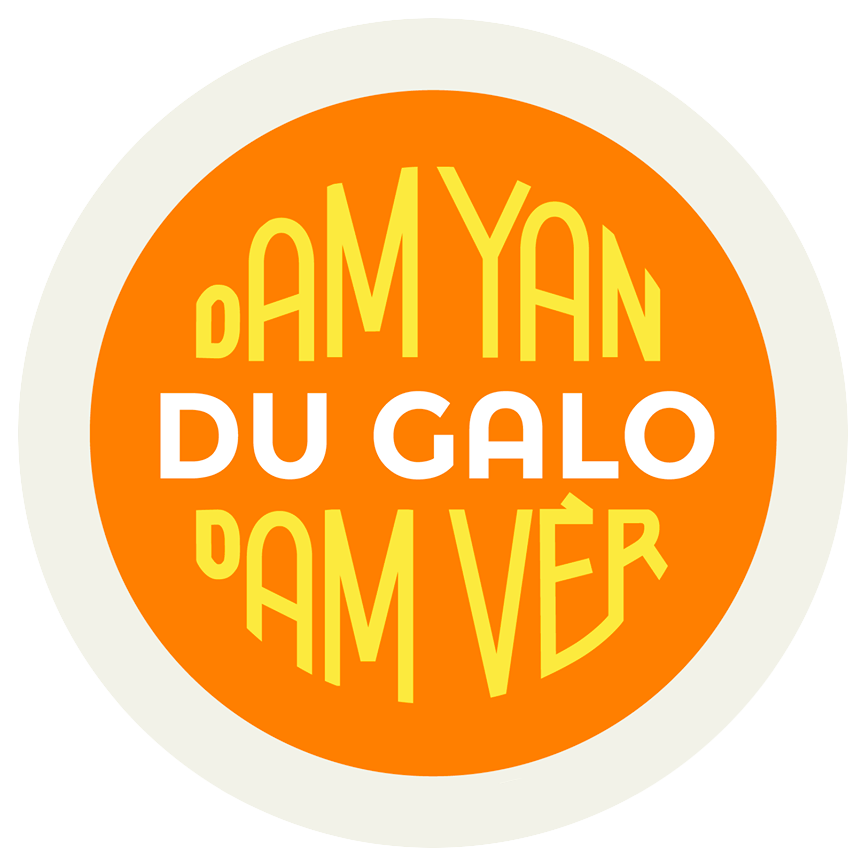 La charte Du Galo, dam Yan, dam Vèr ! est un dispositif porté par l'Institut du Galo qui permet à tout type de structure d'inclure la langue gallèse au quotidien.